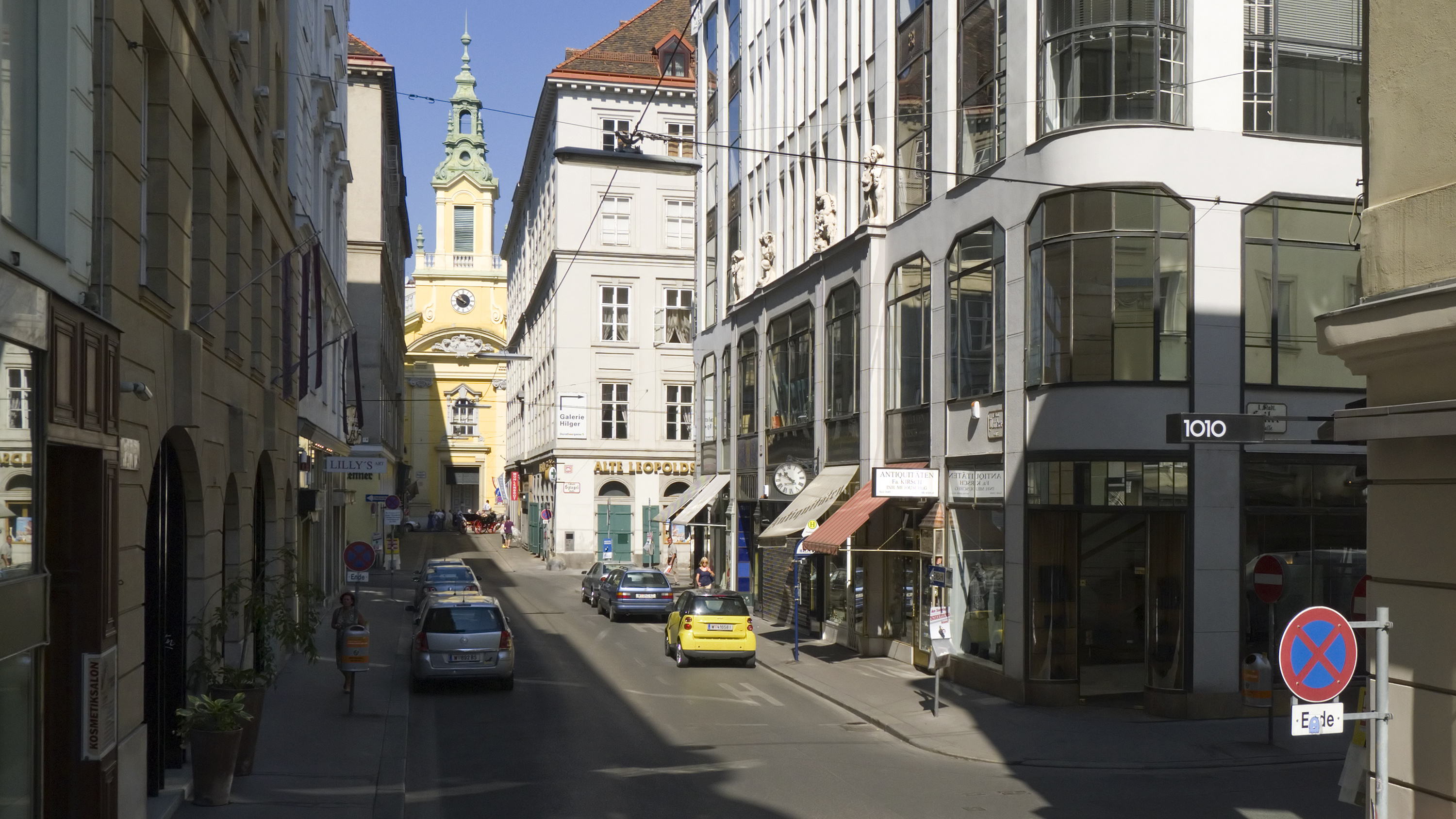 Plankengasse in Wien 1 bei Nr. 1 Richtung Nordwesten